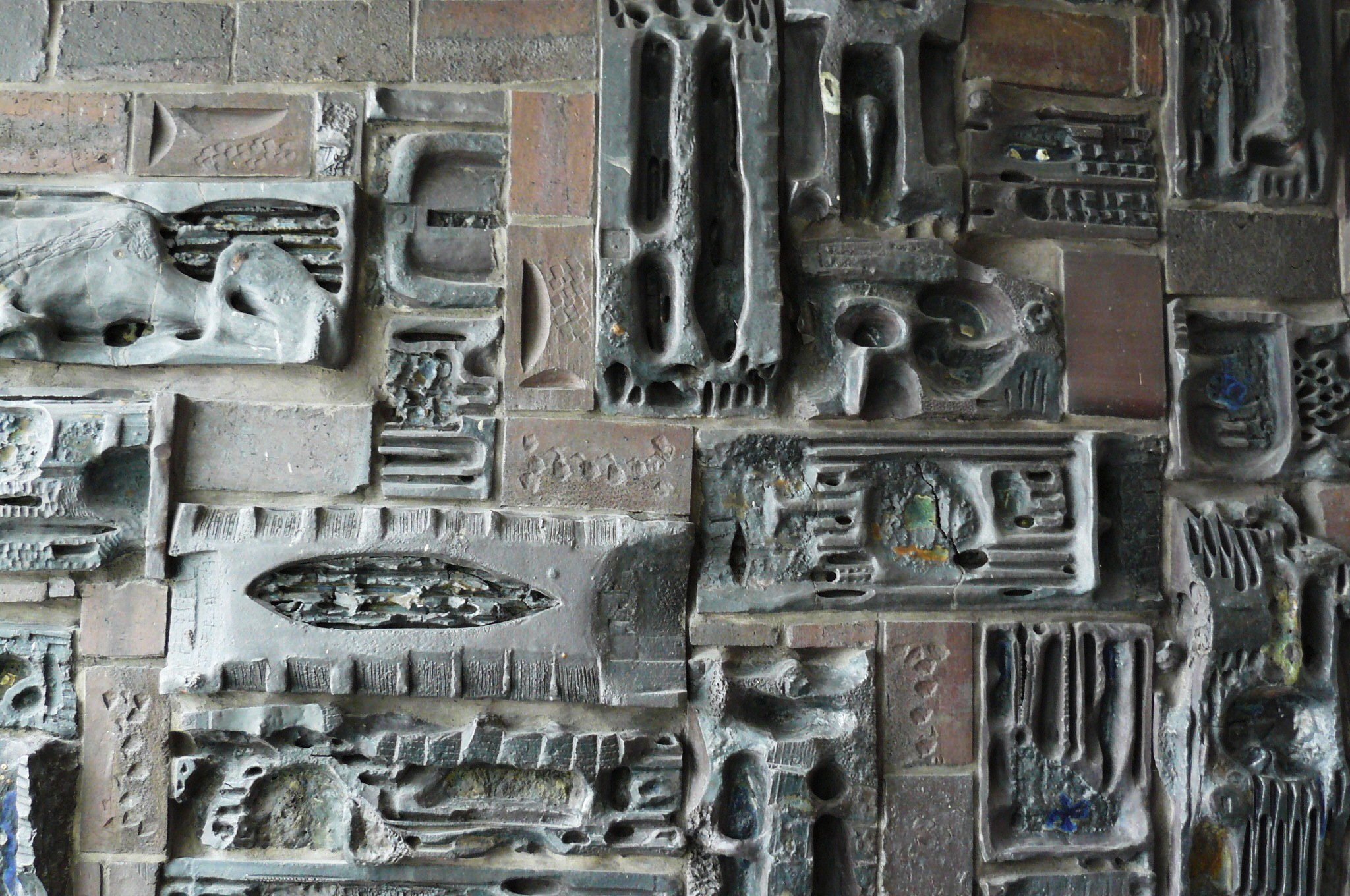 Andrzej Matuszewski, Ceramiczna Ściana Dekoracyjna, Hotel Mercure w Poznaniu.